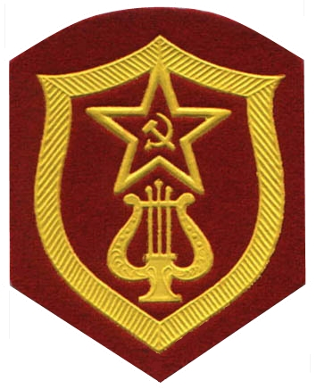 Нарукавная нашивка военных музыкантов (СССР), 1960-1970-е гг.